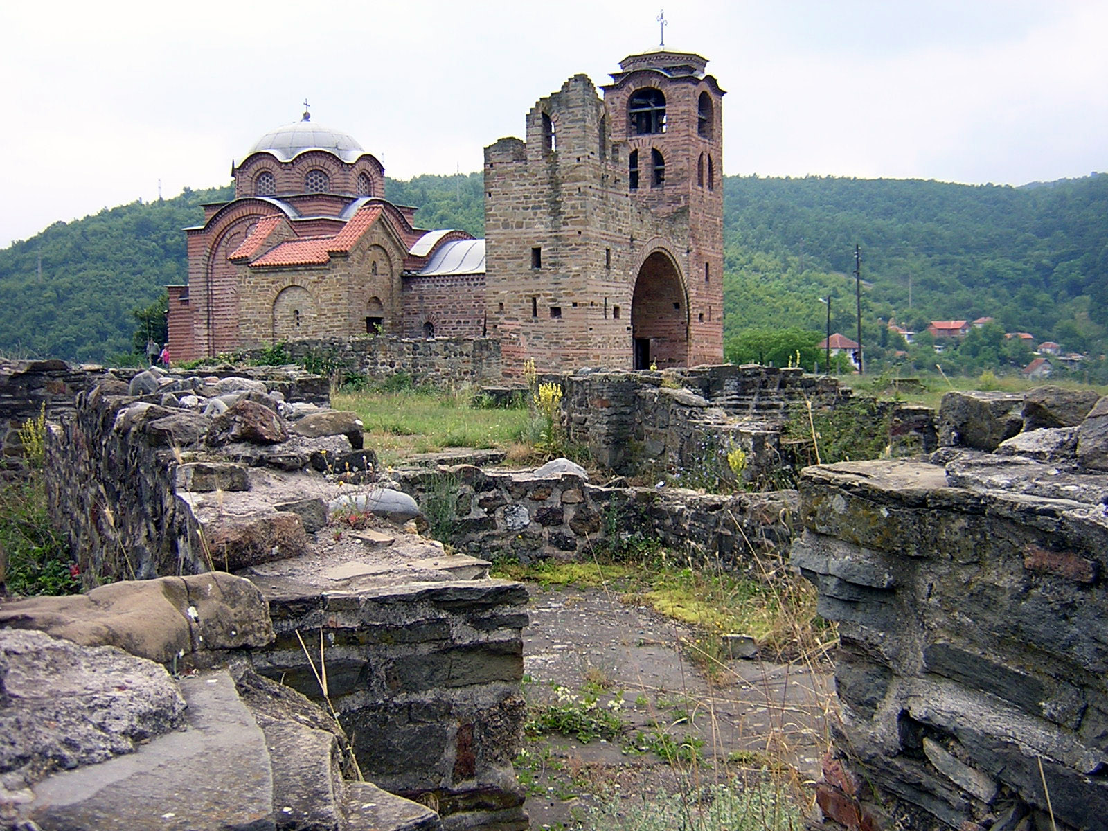 Prva zadužbina Stefana Nemanje iz vremena kada je bio oblasni gospodar. Kuršumlija se po ovoj i Bogorodičnoj crkvi nekada zvala BELE CRKVE. Danas se uveliko obnavlja.